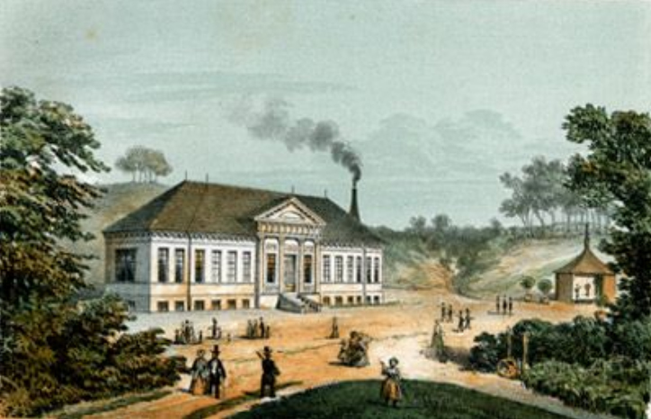 Stahlbad Bad Doberan vor dem Umbau (eingeschossig) ab 1825 Die Grafik gibt das Portal ungenau wieder - tatsächlich handelte es sich um echte Säulen. Der Mauern sind an dieser Stelle um einige Meter zurückgesetzt und nicht mit den Säulen auf einer Ebene.